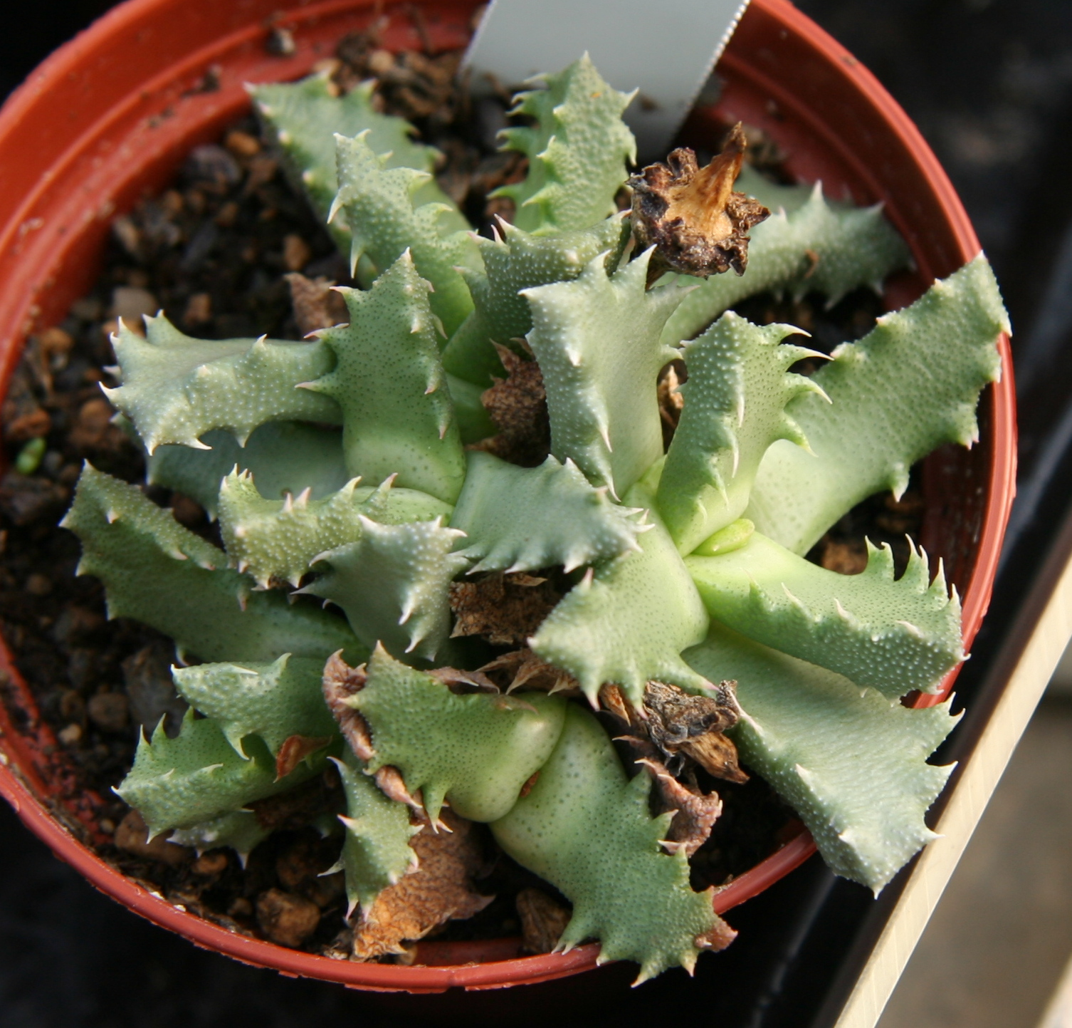 Stomatium trifarium in Kultur bei Kakteen-Haage in Erfurt